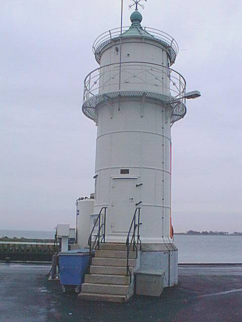 Lighthouse at Aarøsund, Foto: Peter Løhmann